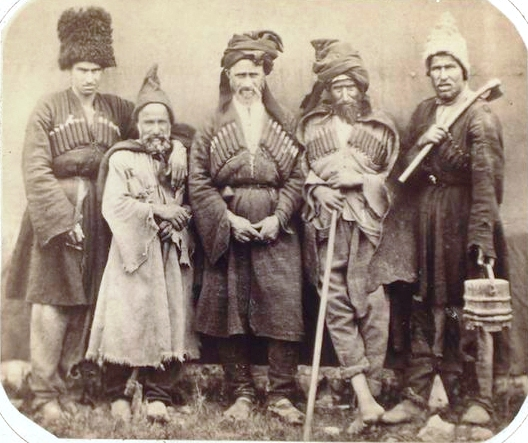 Image Title: Джигети. На востточном берегу ченова моря. фотогр. глав. шт. кав. армии Alternate Title: Types of Life: The Dzhek